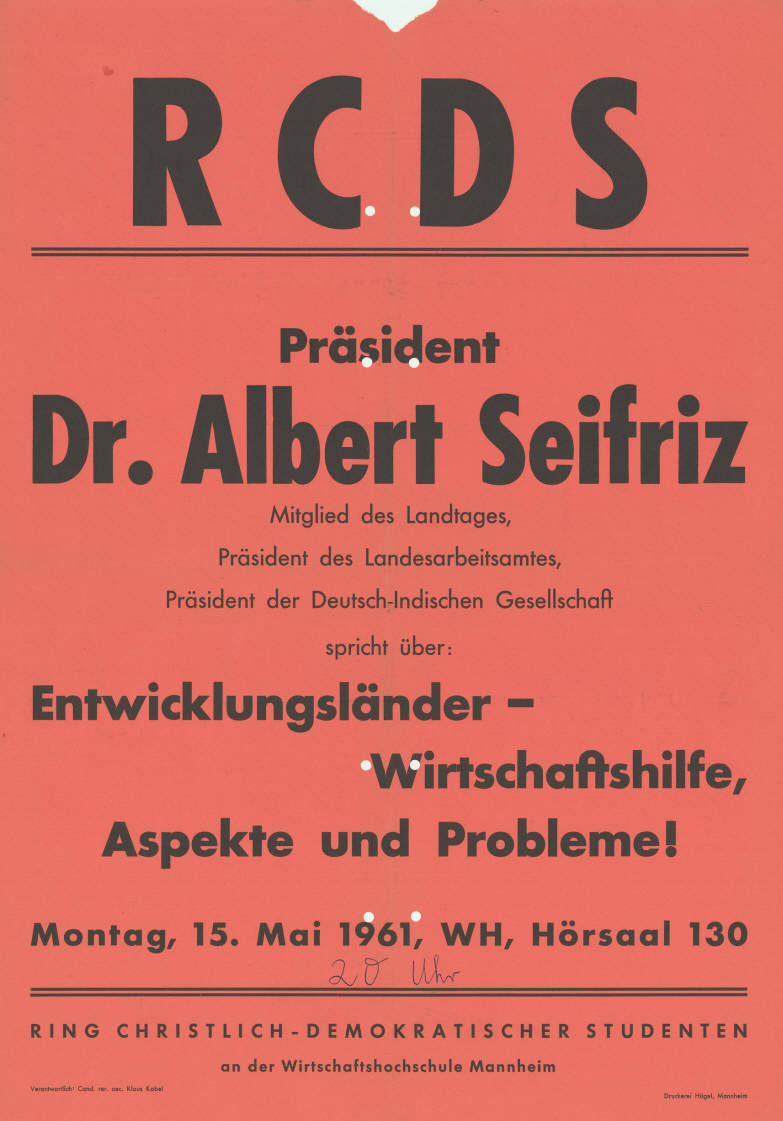 RCDS Präsident Dr. Albert Seifriz Mitglied des Landtages Präsident des Landesarbeitsamtes Präsident der Deutsch-Indischen Gesellschaft spricht über: Entwicklungsländer - Wirtschaftshilfe, Aspekte und Probleme! ... Ring Christlich-Demokratischer Studenten an der Wirtschaftshochschule Mannheim Plakatart: Ankündigungsplakat Auftraggeber: Verantw.: Cand. rer. oec. Klaus Kobel Drucker_Druckart_Druckort: Druckerei Hügel, Mannheim Objekt-Signatur: 10-029 : 56 Bestand: Plakate von Hochschulgruppen (10-029) GliederungBestand10-18: Plakate von Hochschulgruppen (10-029) » RCDS Lizenz: KAS/ACDP 10-029 : 56 CC-BY-SA 3.0 DE